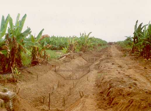 Canal terciario de riego, preparación para su revestimiento Lugar: norte del Perú Autor: Alfredobi Fecha: aprox. 1999